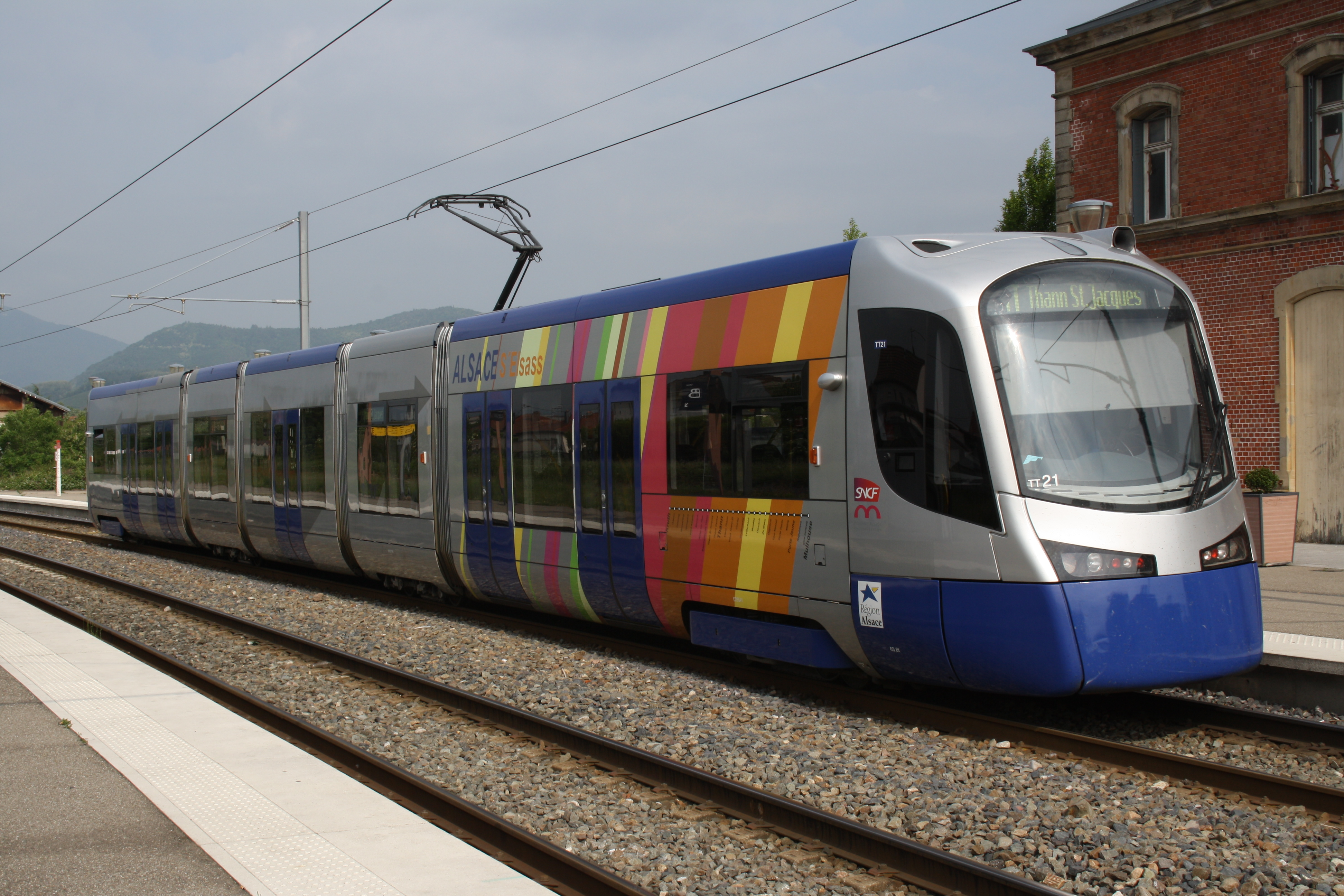 Tram-train en gare de Cernay